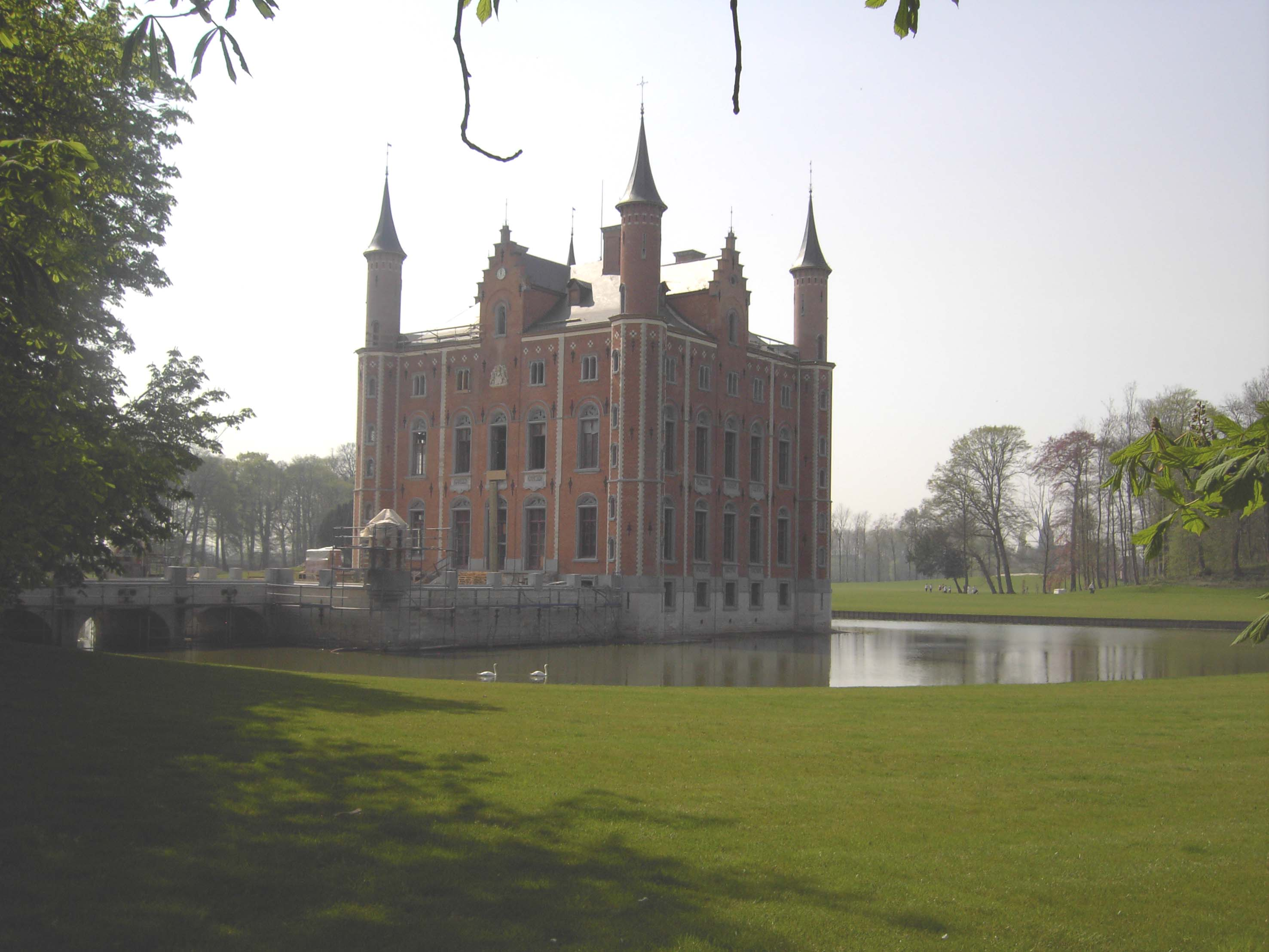 Kasteel van Olsene (2) - Zulte - Oost-Vlaanderen - België